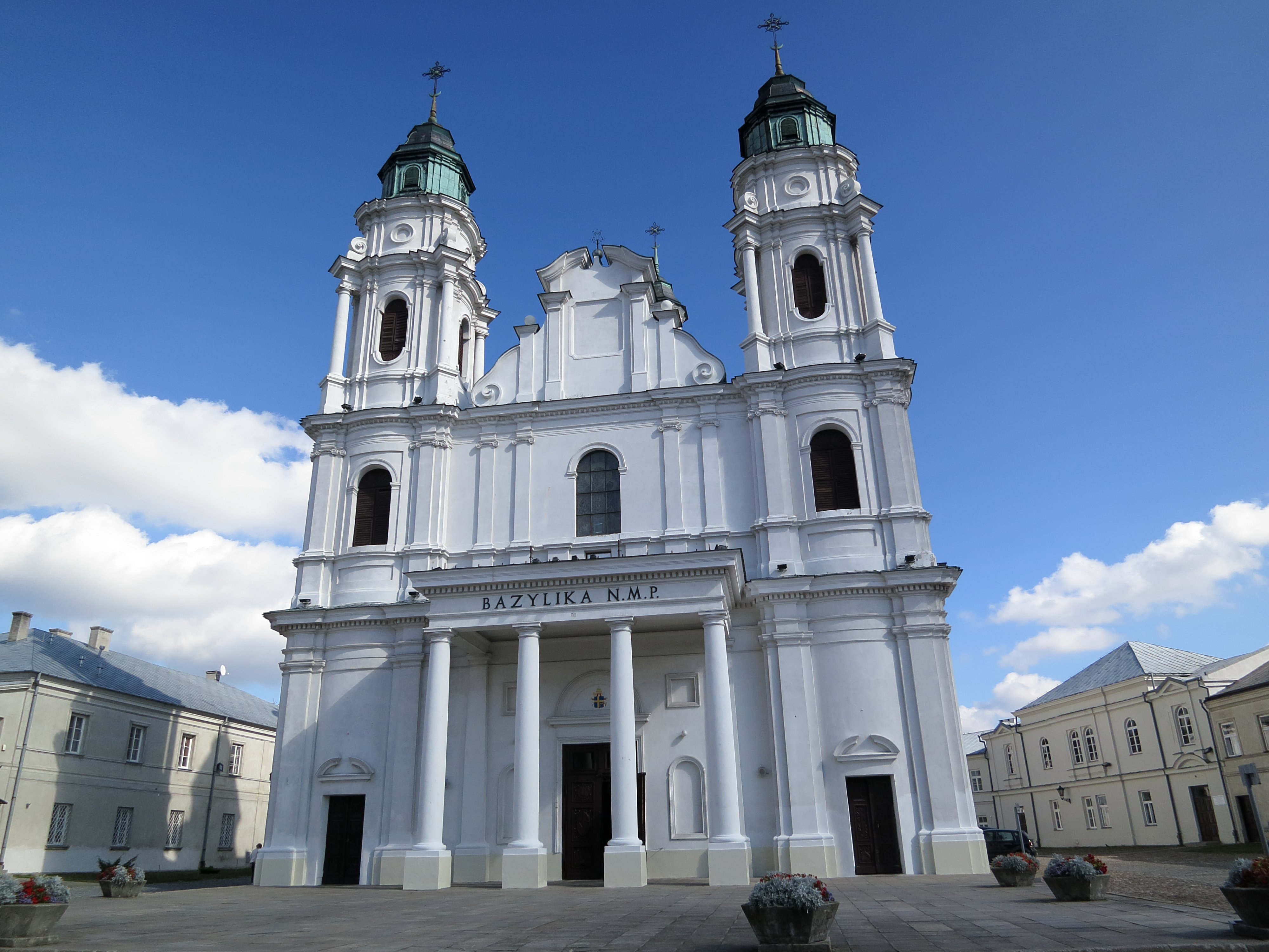 Chełm, dawna katedra greko-kat., ob. kościół rzym.-kat. par. p.w. Narodzenia NMP, XVII/XVIII